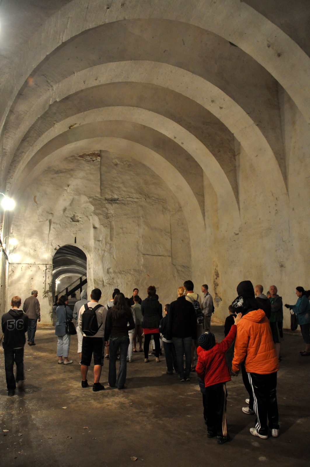 Catholic chapel in Kőbánya limestone mine